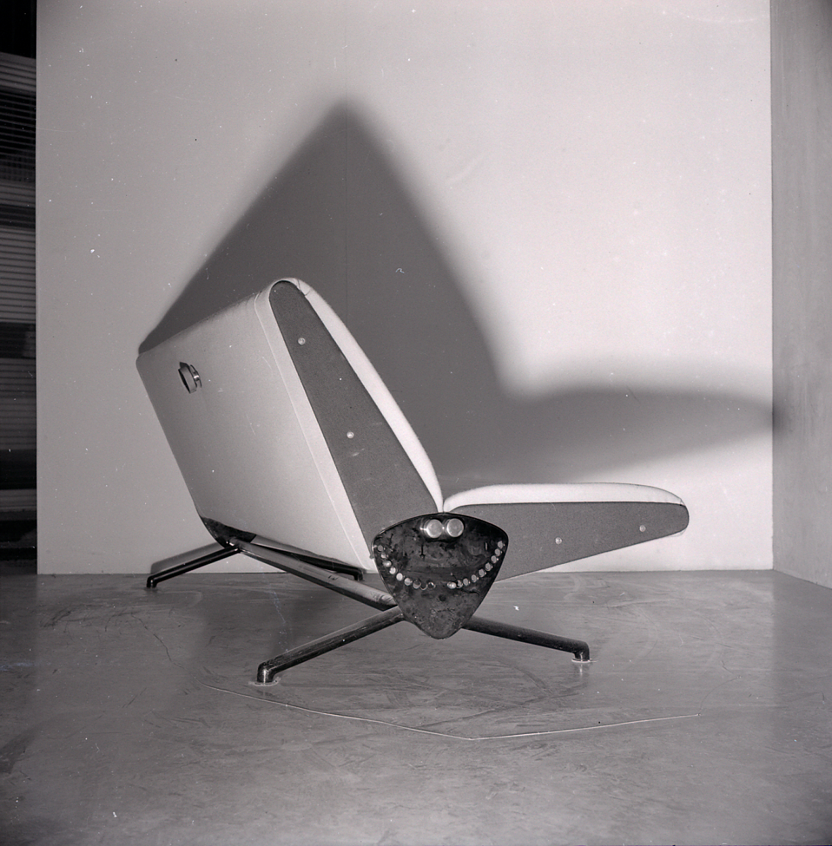 Servizio fotografico : Italia, 1954 / Paolo Monti. - Buste: 22, Fototipi: 22 : Negativo b/n, gelatina bromuro d'argento/ pellicola ; 6x6. - ((Serie costituita da 22 negativi identificati con i nn.: 20540-20563. Sulla busta R20540 manoscritto: "Copertina Domus/ Febb. 54/ Divano Borsani (Escluse)". La suddetta serie è contenuta nella scatola identificata con la numerazione R20420/20798. Sulla scatola manoscritto a pennarello nero: "Architettura/ e design".